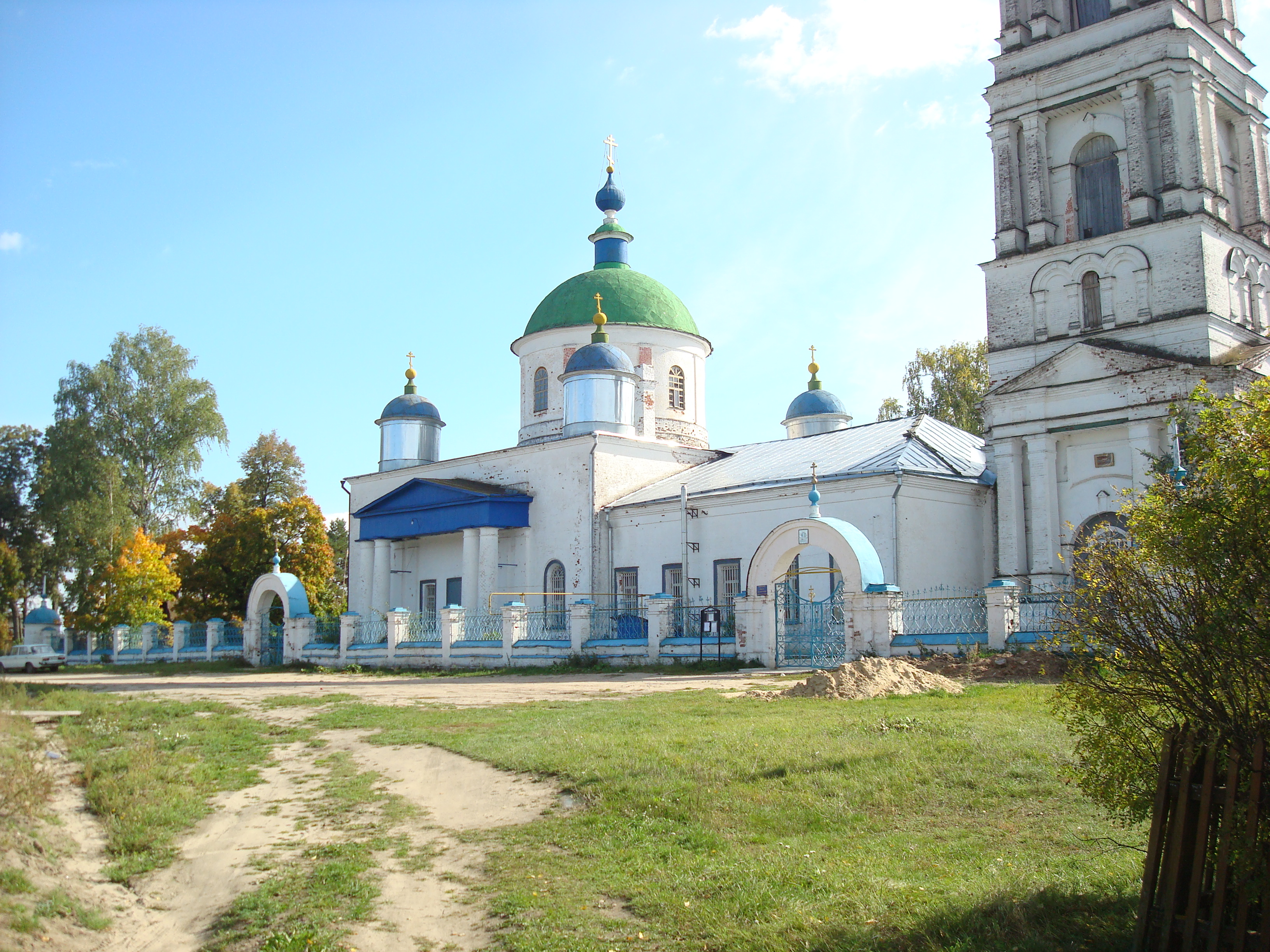 Церковь Преображения Господня: Давыдово, Камешковский район, Владимирская область